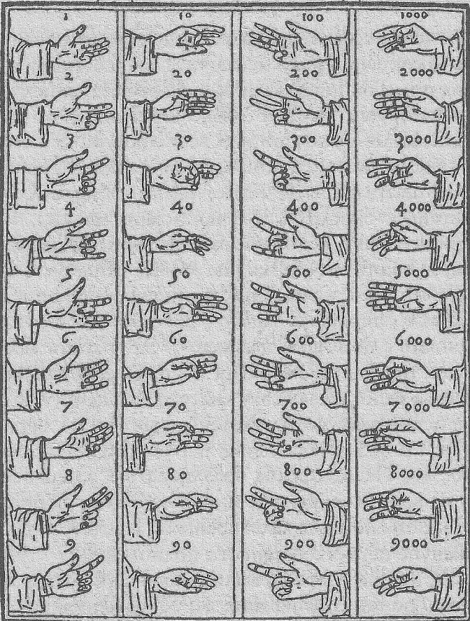 Obscherasprostranenny medieval finger from the book "The amount of arithmetic" Luca Pacioli Italian mathematician / Общераспространённый средневековый пальцевый счёт из книги "Сумма арифметики" итальянского математика Луки Пачоли